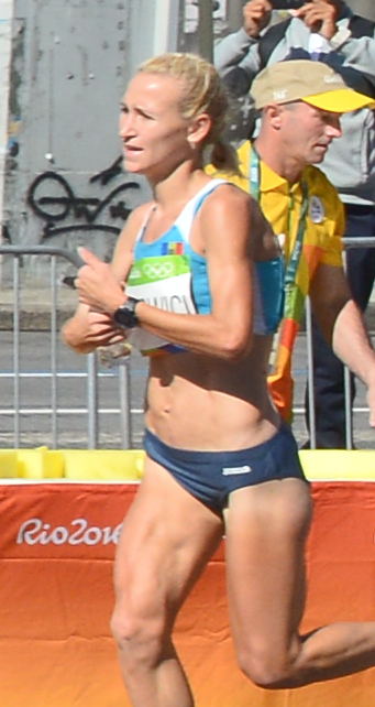 Passage du marathon des jeux olympiques de Rio 2016 dans le centre de Rio